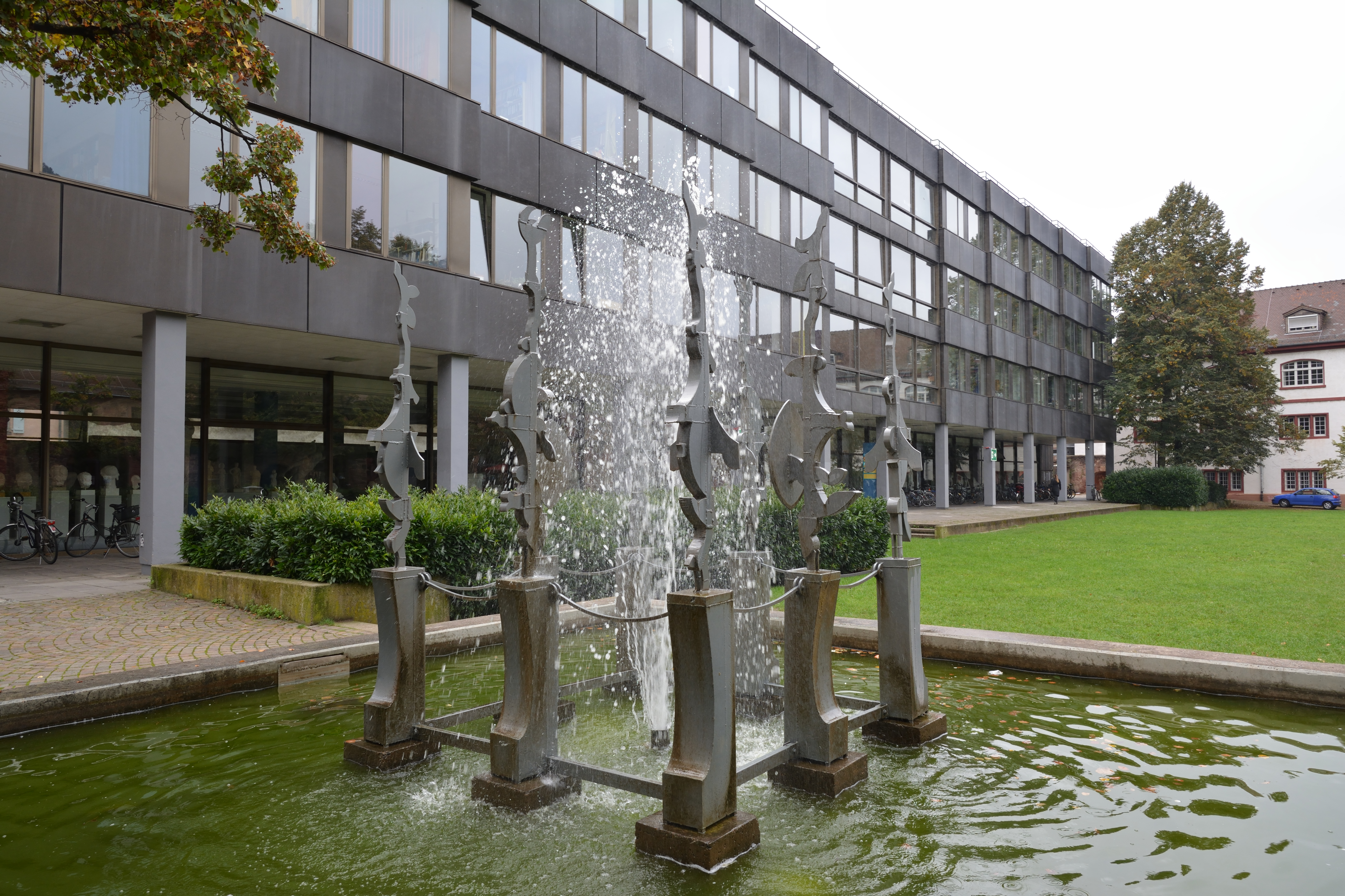 Impressionen einer Veranstaltung: GLAM-on-Tour: Antikenmuseum der Universität Heidelberg 2016